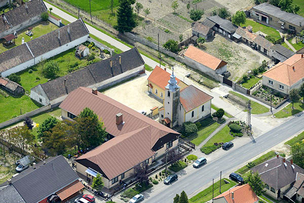 Légi fotó